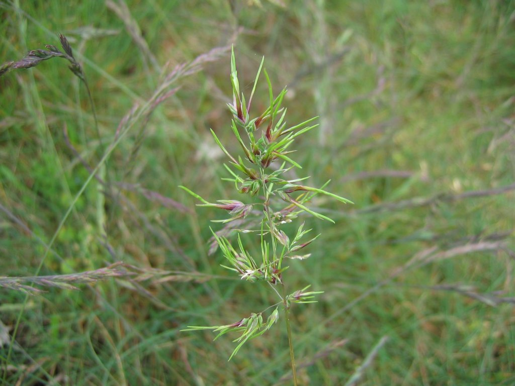 Zwiebel-Rispengras Poa bulbosa